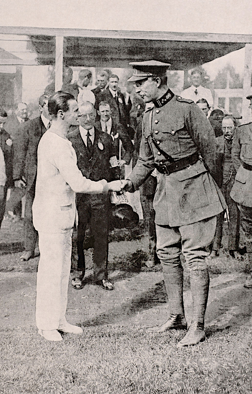 Le roi Albert félicite Joseph Guillemot - L'Illustration - 21 août 1920